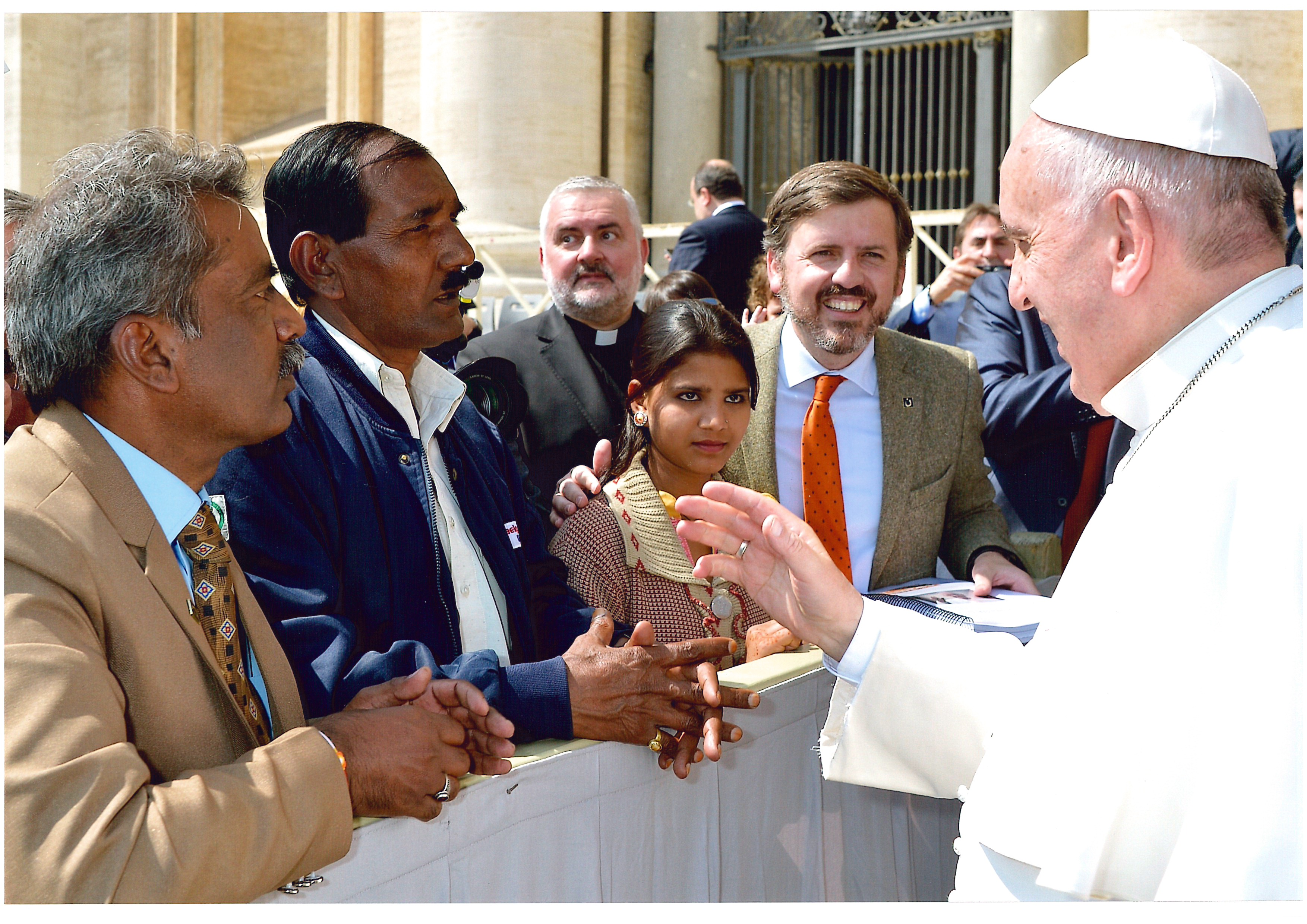 Ignacio Arsuaga, presidente de , junto a Ashiq Masih y Eisham, marido e hija de Asia Bibi